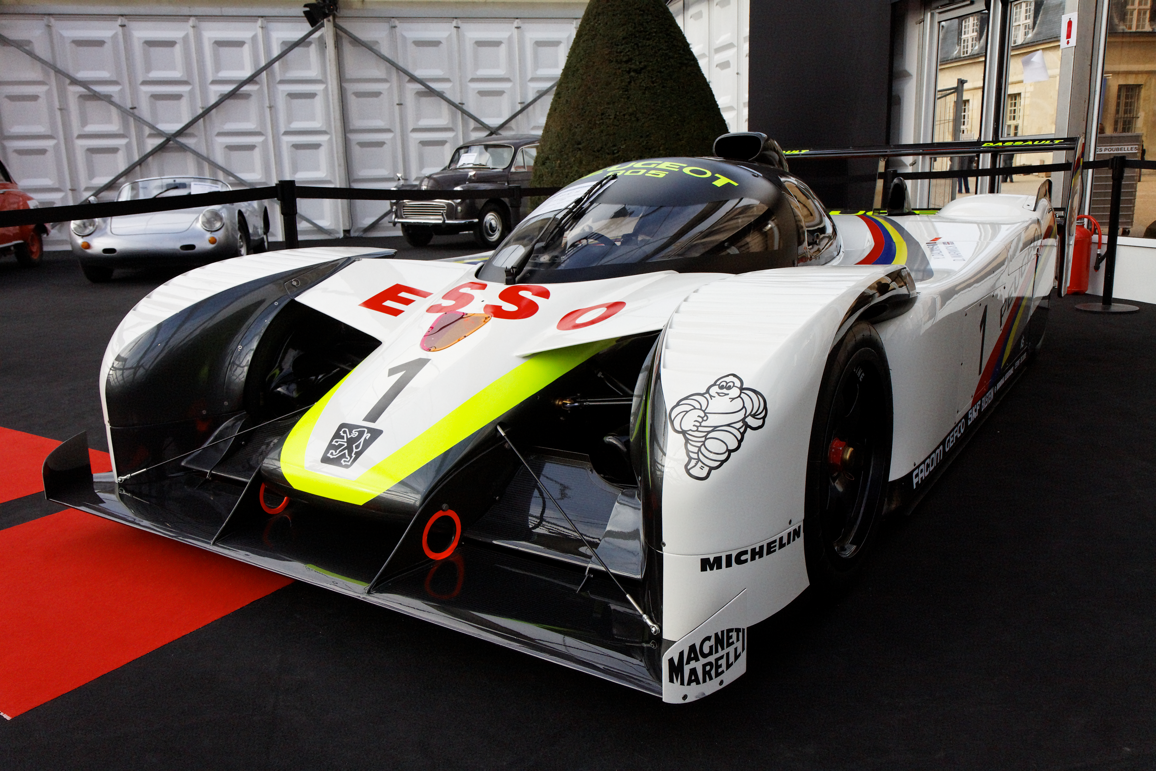 Peugeot 905 - Festival Automobile International 2011 - Vente aux enchères